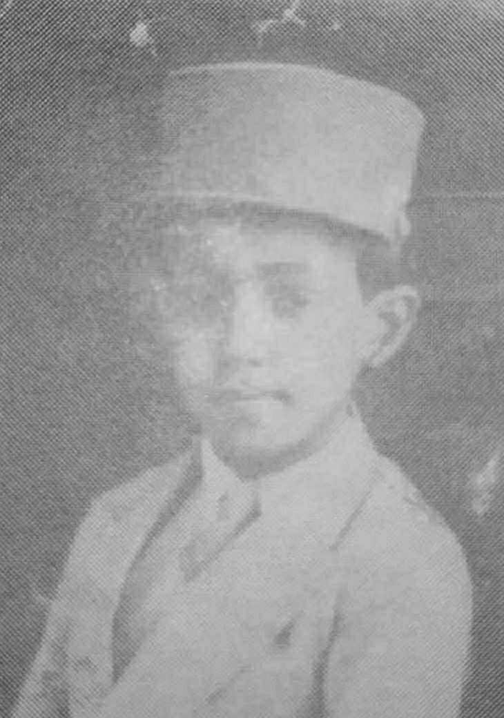 احمد اقتداری در کودکی